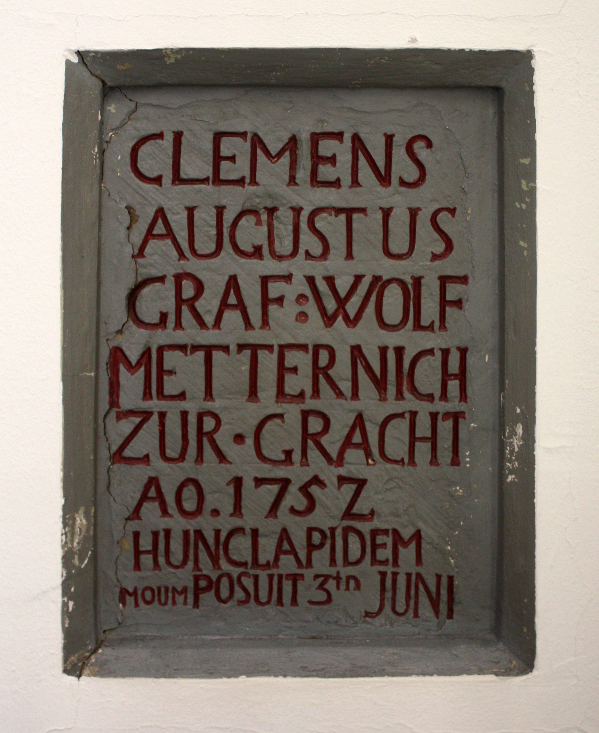 Lechenich, Rathaus. Grundstein- Gedenkplatte 1752